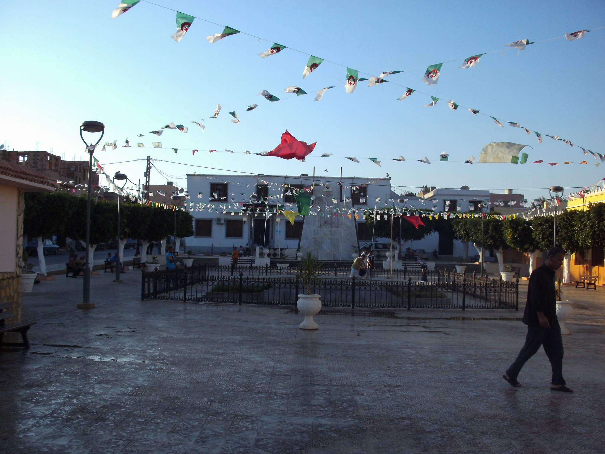 Mairie de la Commune de Boutlelis (wilaya d'Oran)